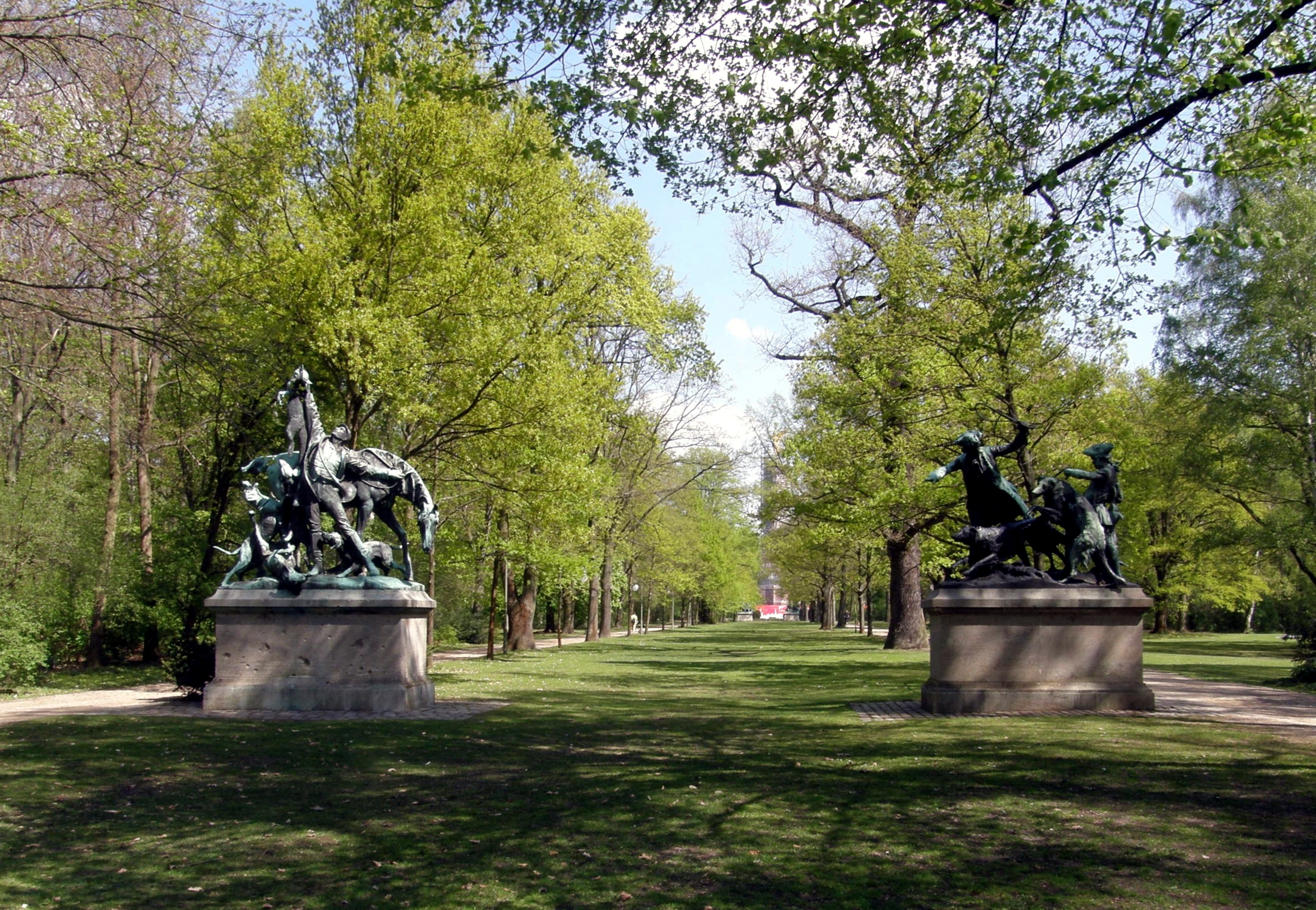 Fasanerieallee im Großen Tiergarten im Berlin-Tiergarten. Flankiert von vier Skulpturen die Jagdgruppen darstellen. Diese wurden beauftragt von Kaiser Wilhelm II und standen ursprünglich ab 1907 am Großen Stern. Die Versetzung erfolgte im Rahmen des nationalsozialisten Ausbaus der OSt-West-Achse.